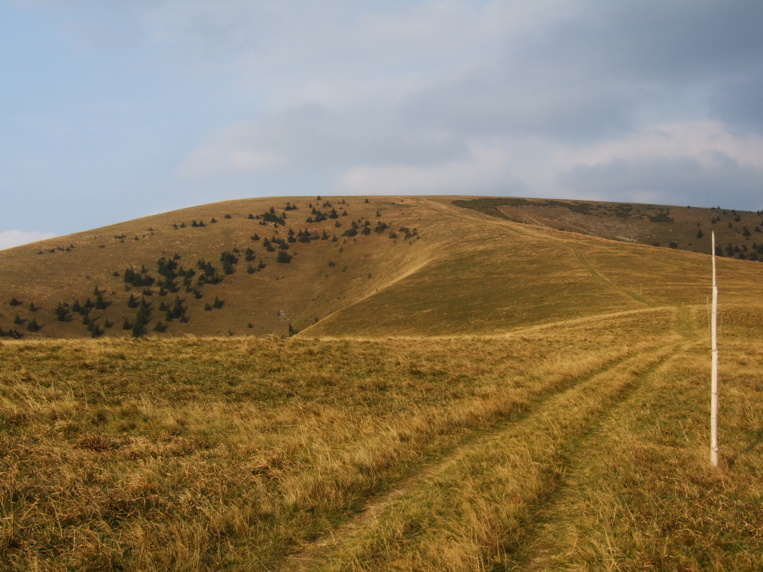 Ploská - pohled z vrchu Chyžky